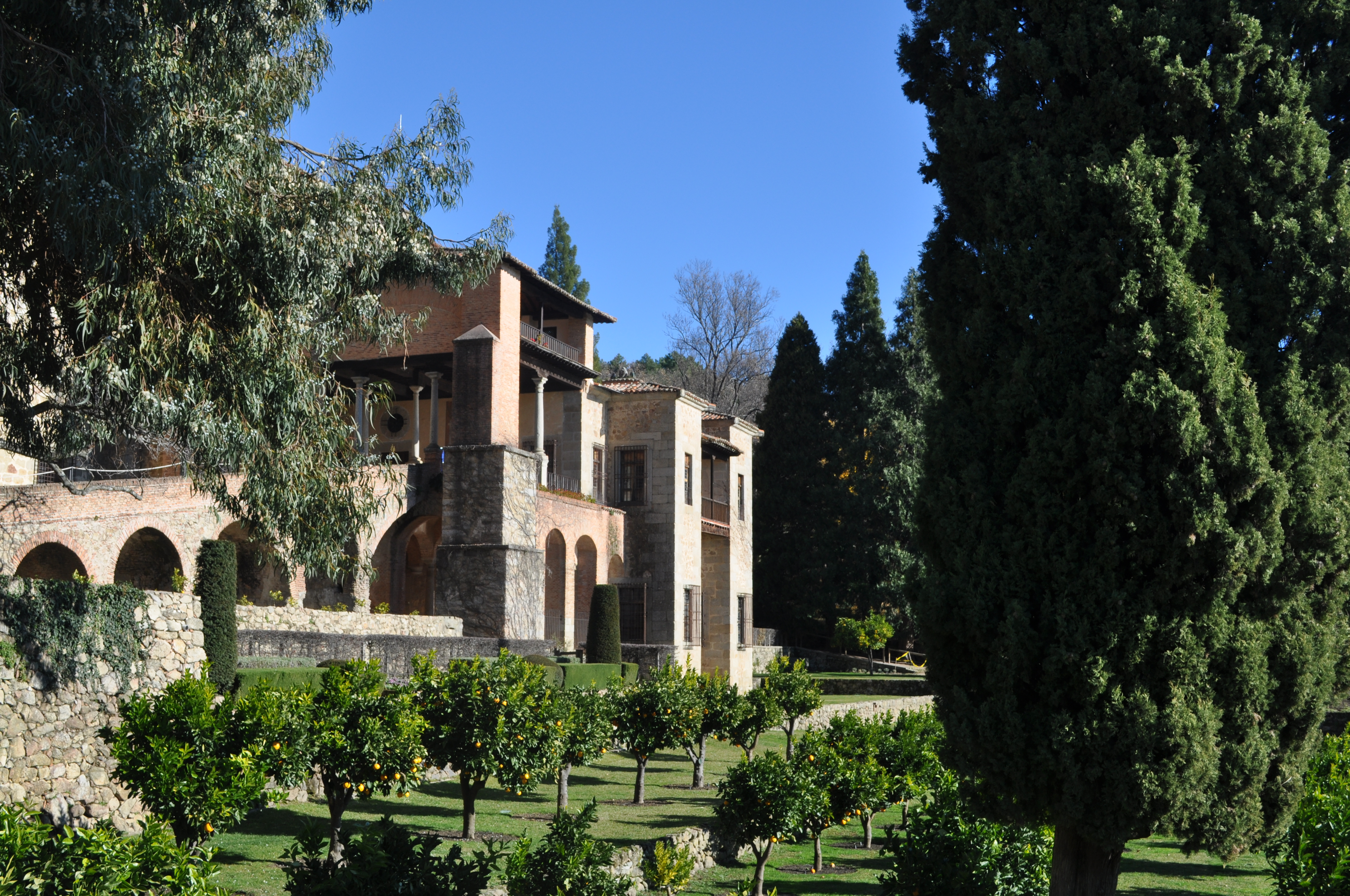 Monasterio de Yuste This is a photography of a Special Area of Conservation in Spain with the ID: ES4320078. Natura2000 entry, EEA entry